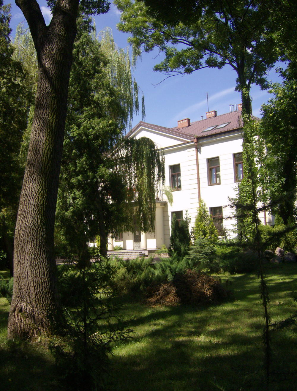 Dom parafialny w Garwolinie